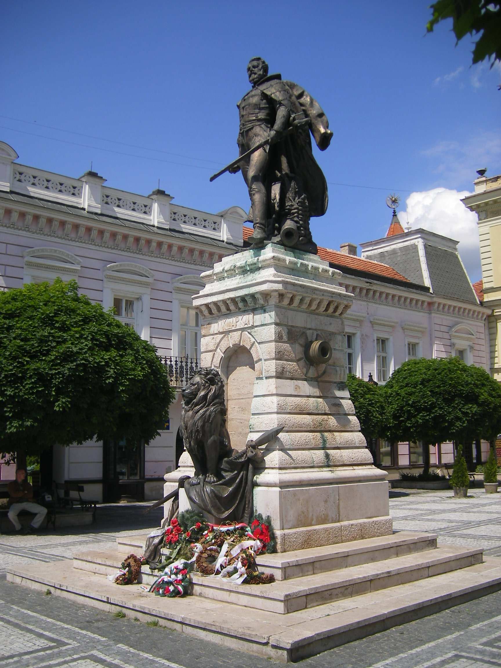 Komárom - Klapka György szobra a Klapka-téren